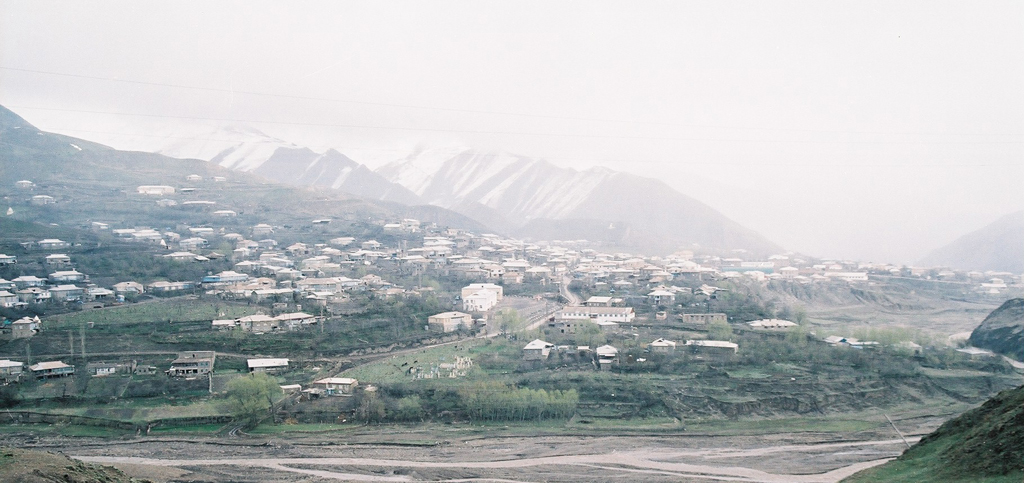 Селение Курах одноименного района республики Дагестан.